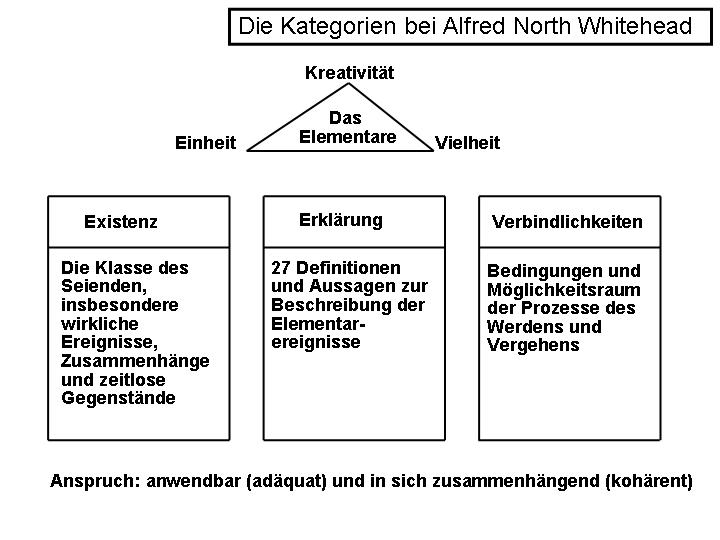 Schema zur Struktur der Kategorien bei Alfred North Whitehead